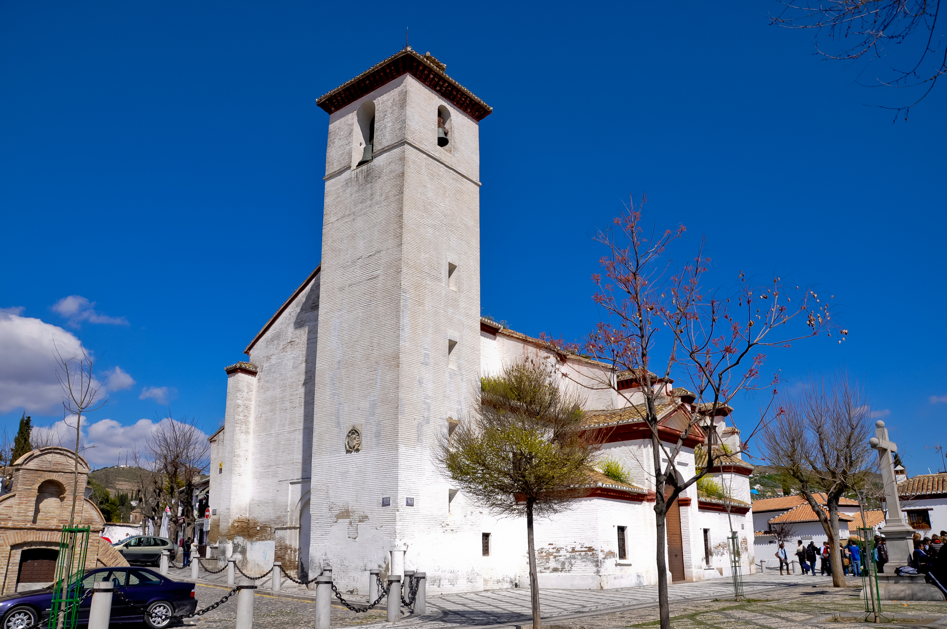 Iglesia de San Nicolás in Granada, Spanje